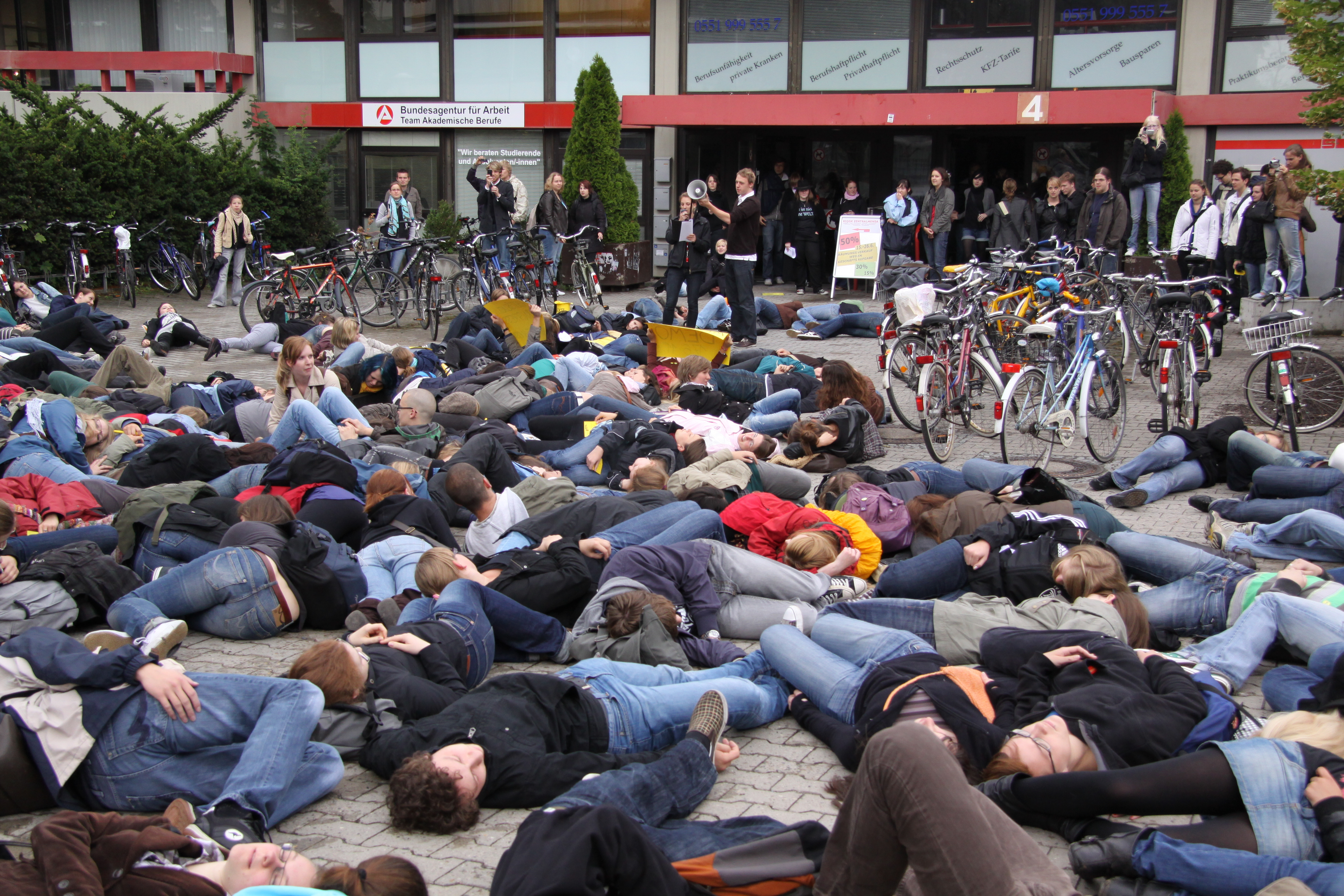 Teilnehmer der Aktion „Kollektiver Zusammenbruch“ beim Bundesweiten Bildungsstreiks 2009 in Göttingen: „Um exakt 12 Uhr 10 brechen alle Studenten kollektiv zusammen. Die Ursache: Chronische Überlastung durch unzumutbare Studienbedingungen.“